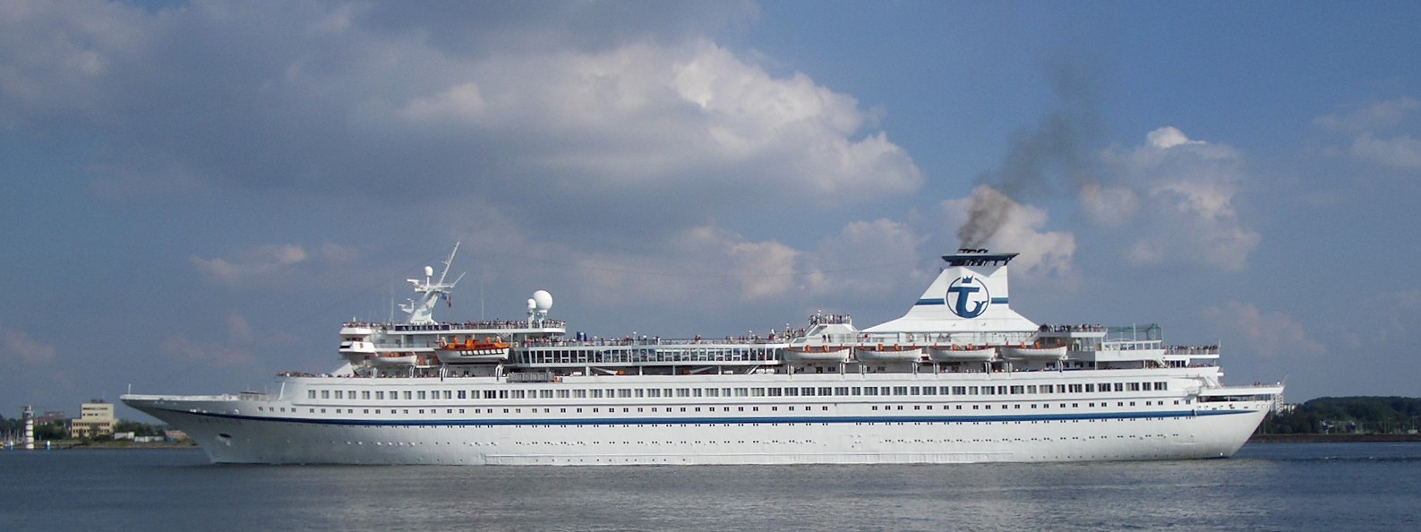 Kreuzfahrtschiff Arielle im Kieler Hafen. Information about Arielle may be found at IMO 7027411.A ship can change name and flag state through time, but the IMO number remains the same through the hull's entire lifetime. As a result, it can be useful to identify a ship by using the IMO number.